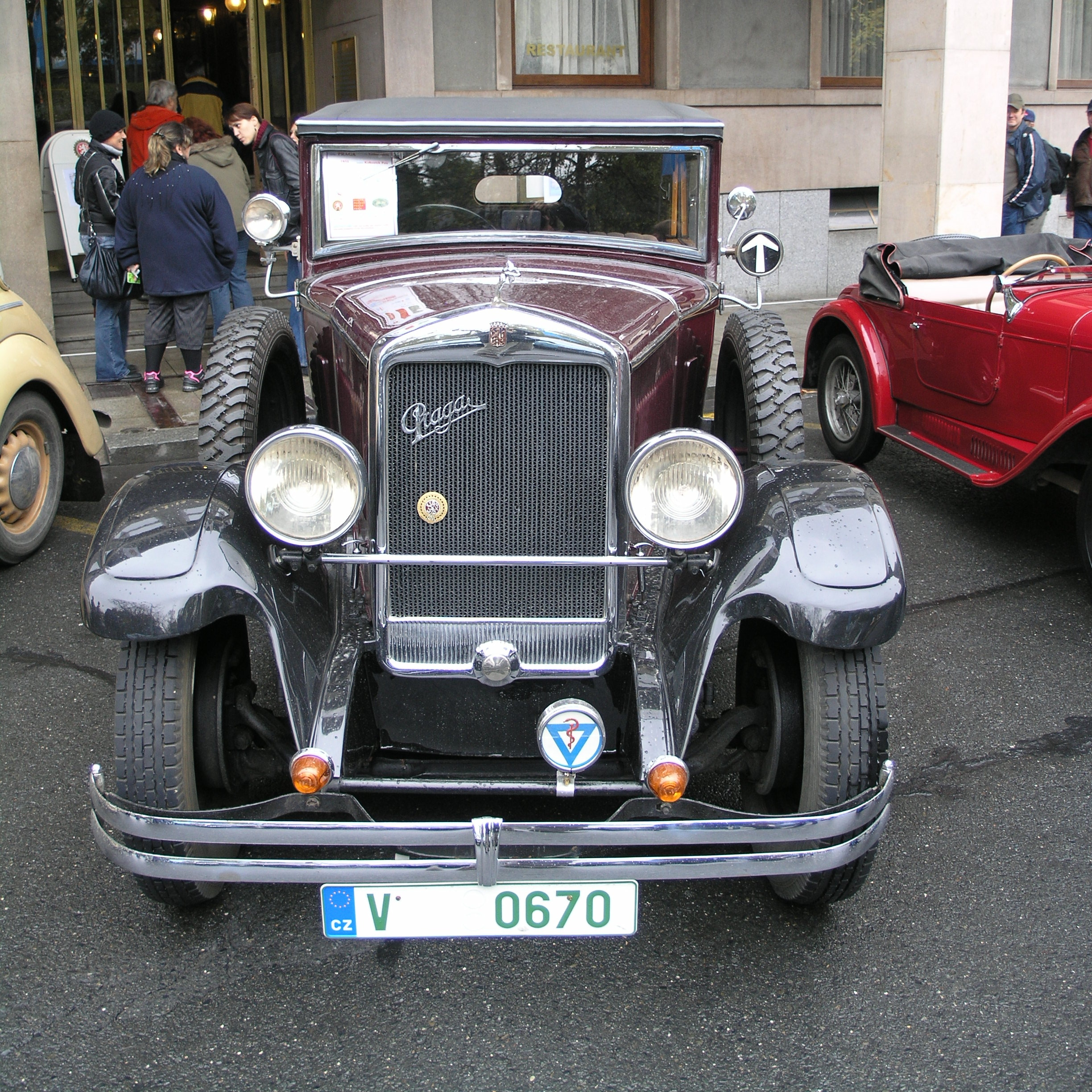 Vůz Praga Kellner cabrio (19) účastnící se jízdy veteránů u příležitosti 90. výročí vzniku samostatného Československa, 28. října 2008